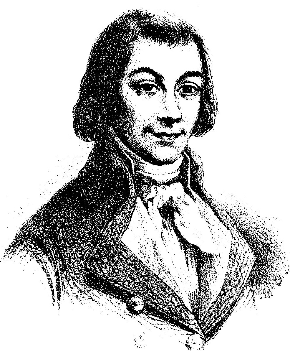 Portret van geneeskundige Jean-François Vandorpe. auteursrecht verjaard (1804)